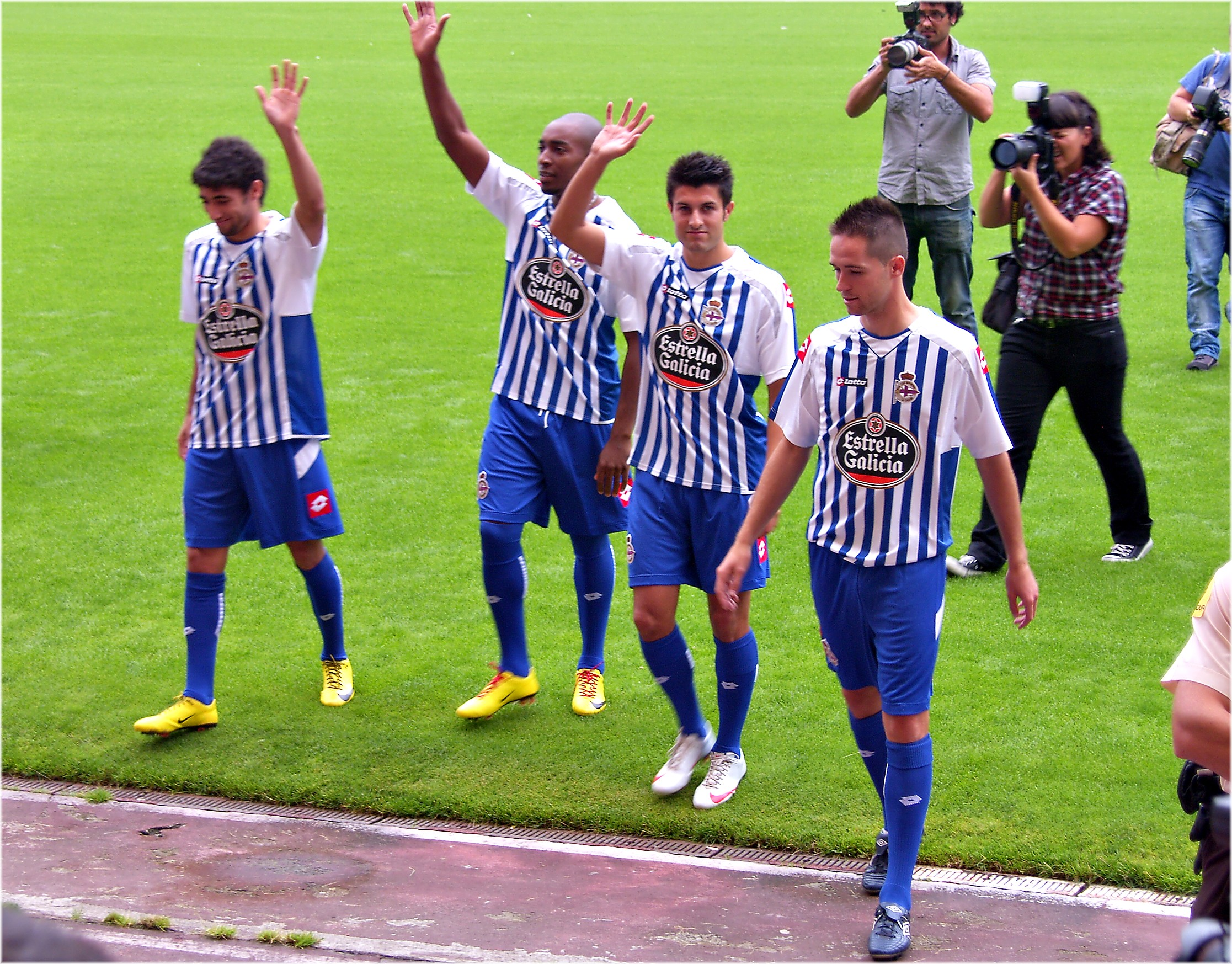 Novas fichaxes do Deportivo de La Coruña 2010-2011. Urreta-Desmarets-Saul y Michel, presentados ayer como nuevos fichajes para la proxima temporada proceden del Peñarol (Uruguay), Victoria de Guimaraes (Portugal) Elche y Valencia.